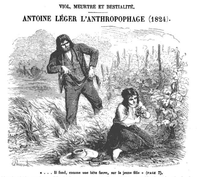 Gravure représentant Antoine Léger se préparant à étrangler sa victime Aimée Constance Debully avant de la violer et d'en consommer une partie de la chair